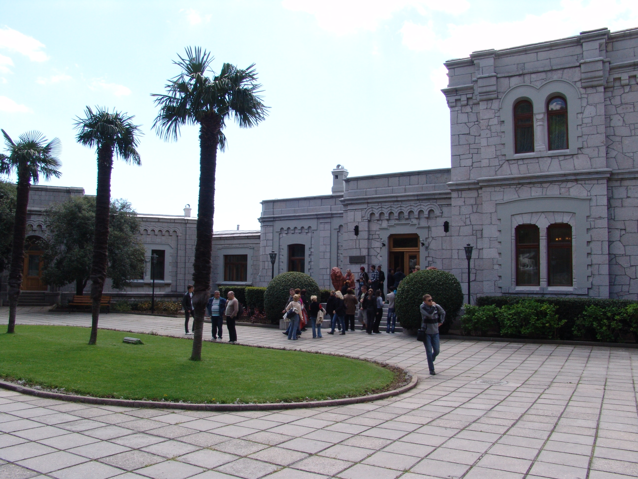 Юсуповский дворец. Кореиз Сейчас дворец Юсупова - режимный объект в собственности СБУ. Одновременно это окруженная высоченным забором «гостиница по звонку». Увидеть его можно только со смотровой площадки, которая расположена возле поселкового совета в Кореизе. Или во время экскурсии ...